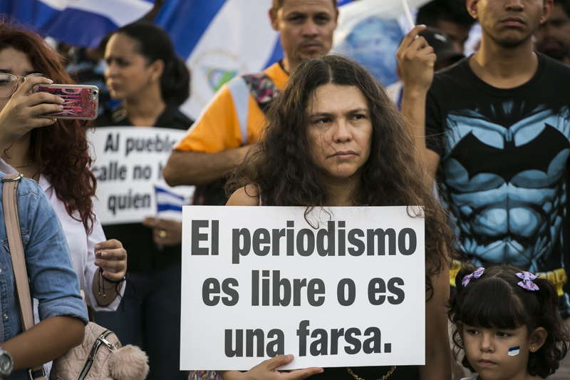 Homenaje a Angel Gahona periodista asesinado en Nicaragua